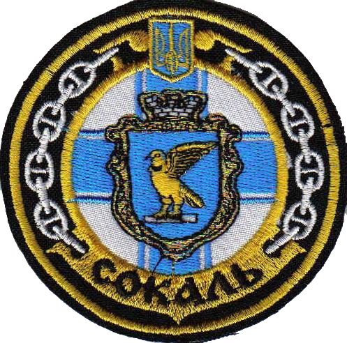 (U782) Сокаль